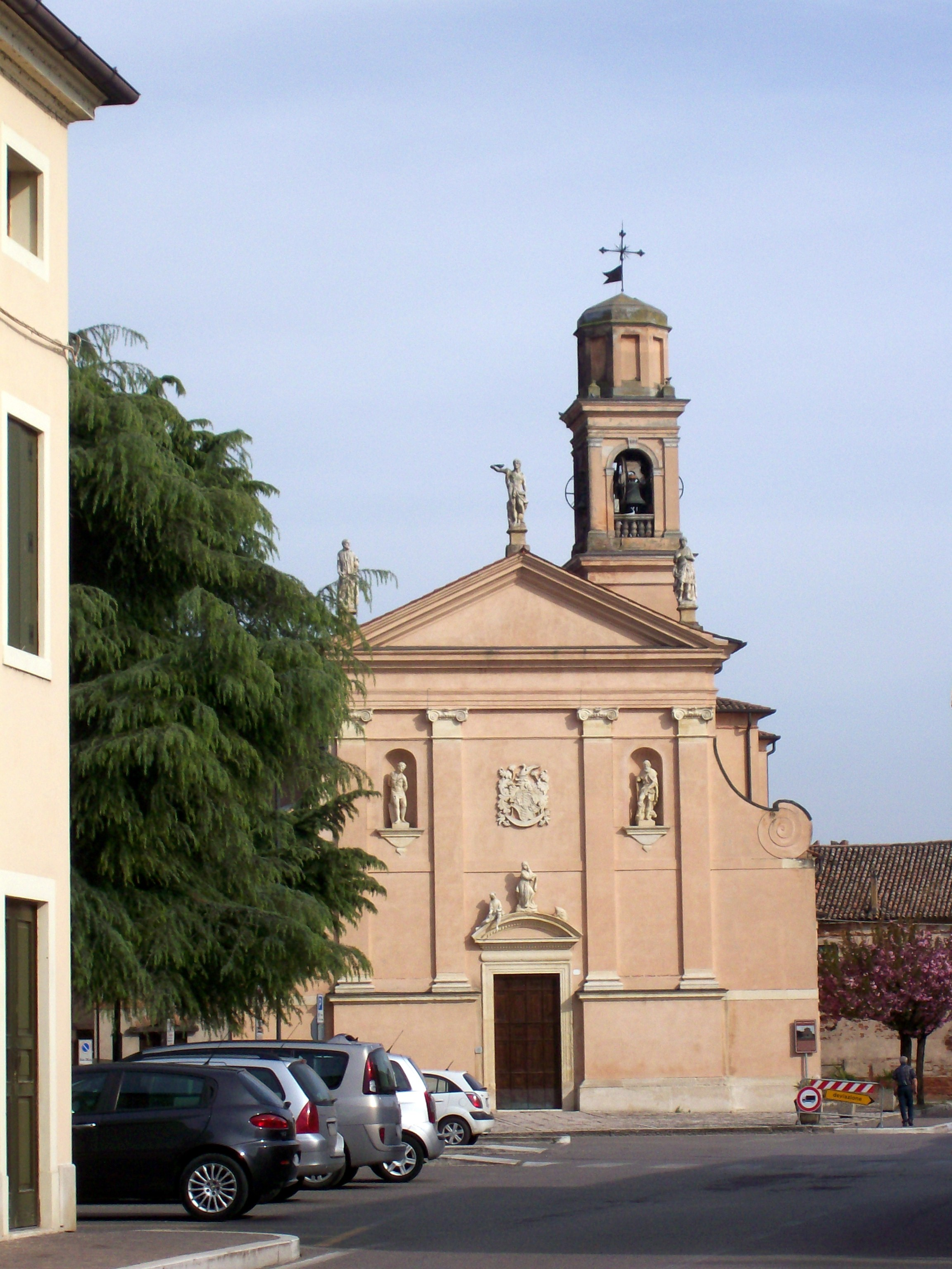 Chiesa parrocchiale di Veronella (VR).